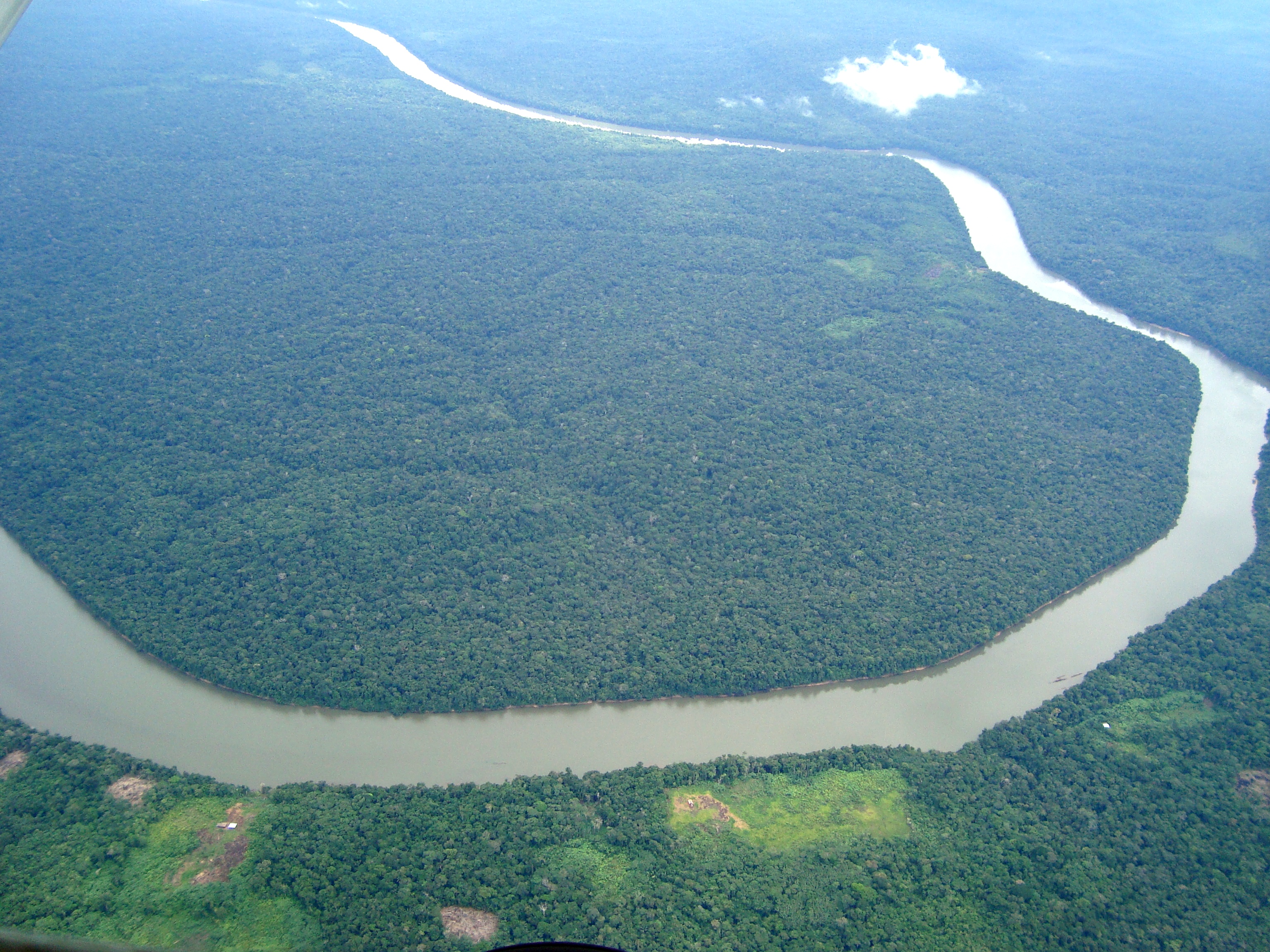 Fruro trabajo 2